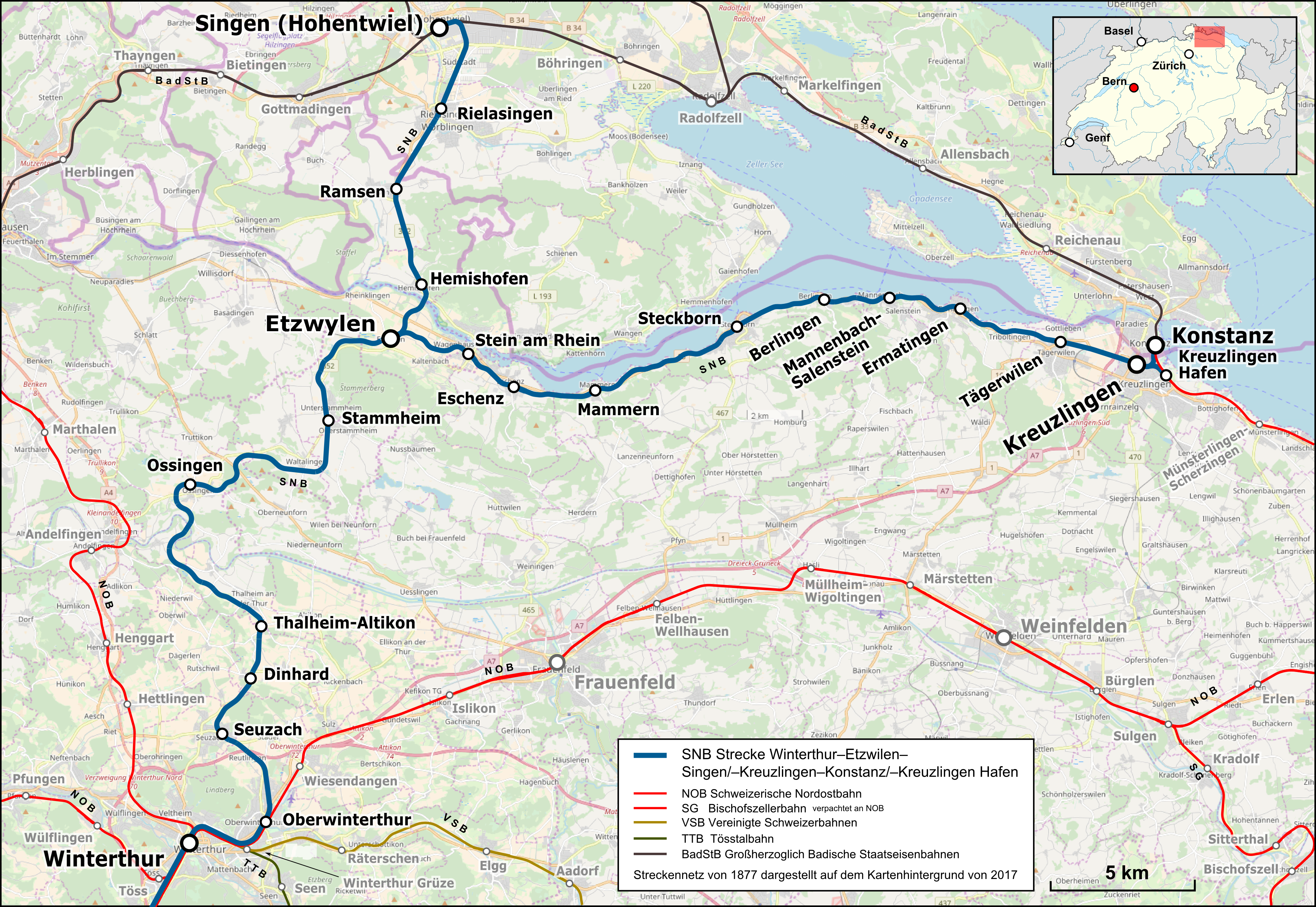 Karte der Strecke Winterthur—Etzwilen—Singen/—Kreuzlingen—Konstanz/—Kreuzlingen Hafen der Schweizerischen Nationalbahn dargestellt im Eisenbahnnetz von 1877.